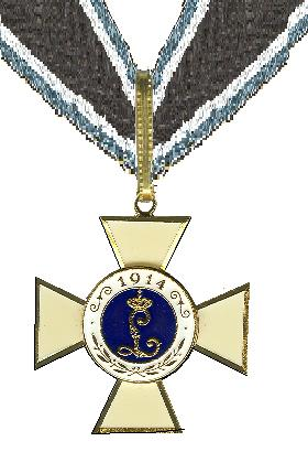 Scan van een kruis in mijn verzameling